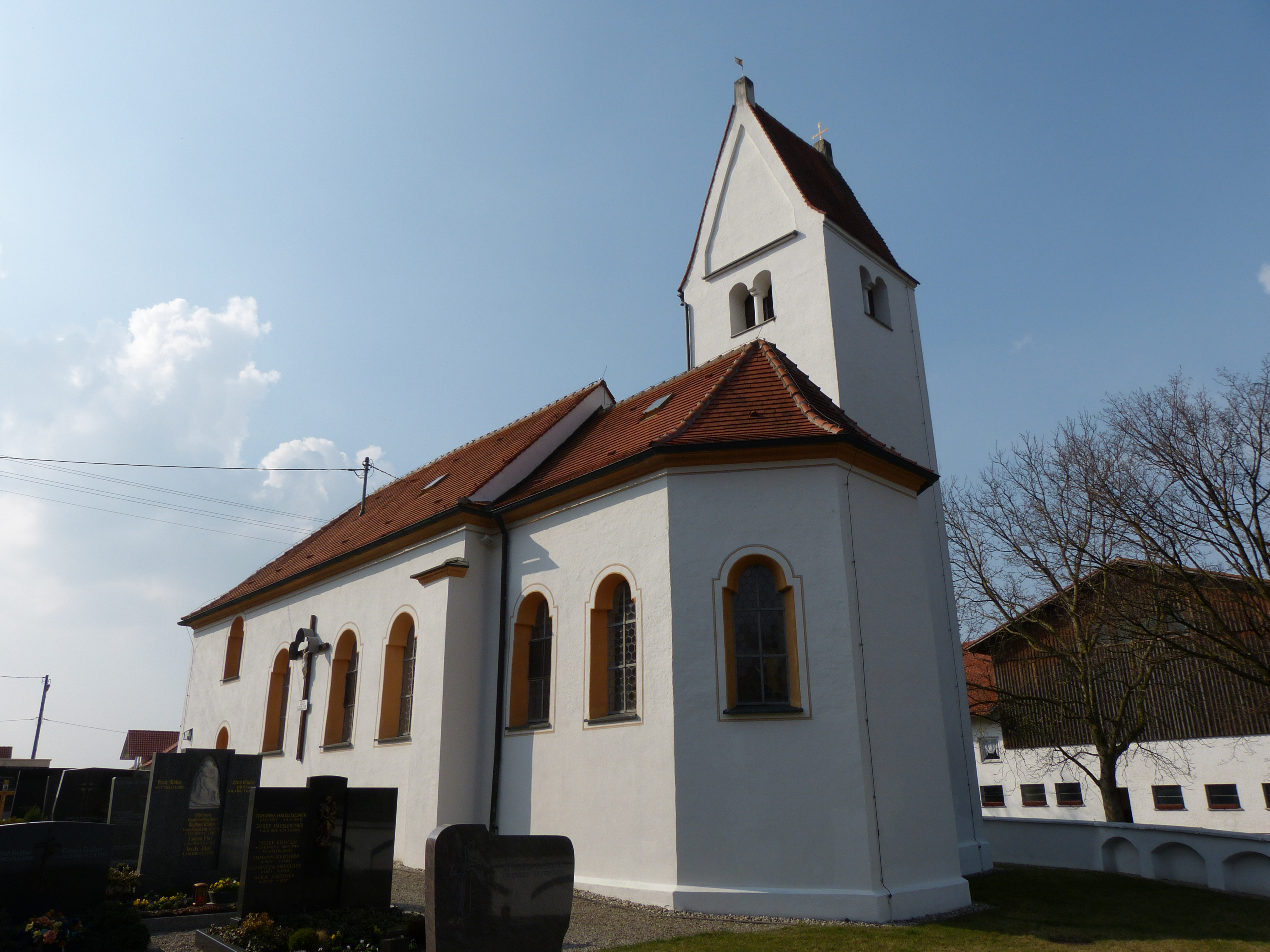 St. Peter, Altisried, Gemeinde Markt Rettenbach, Landkreis Unterallgäu, Bayern